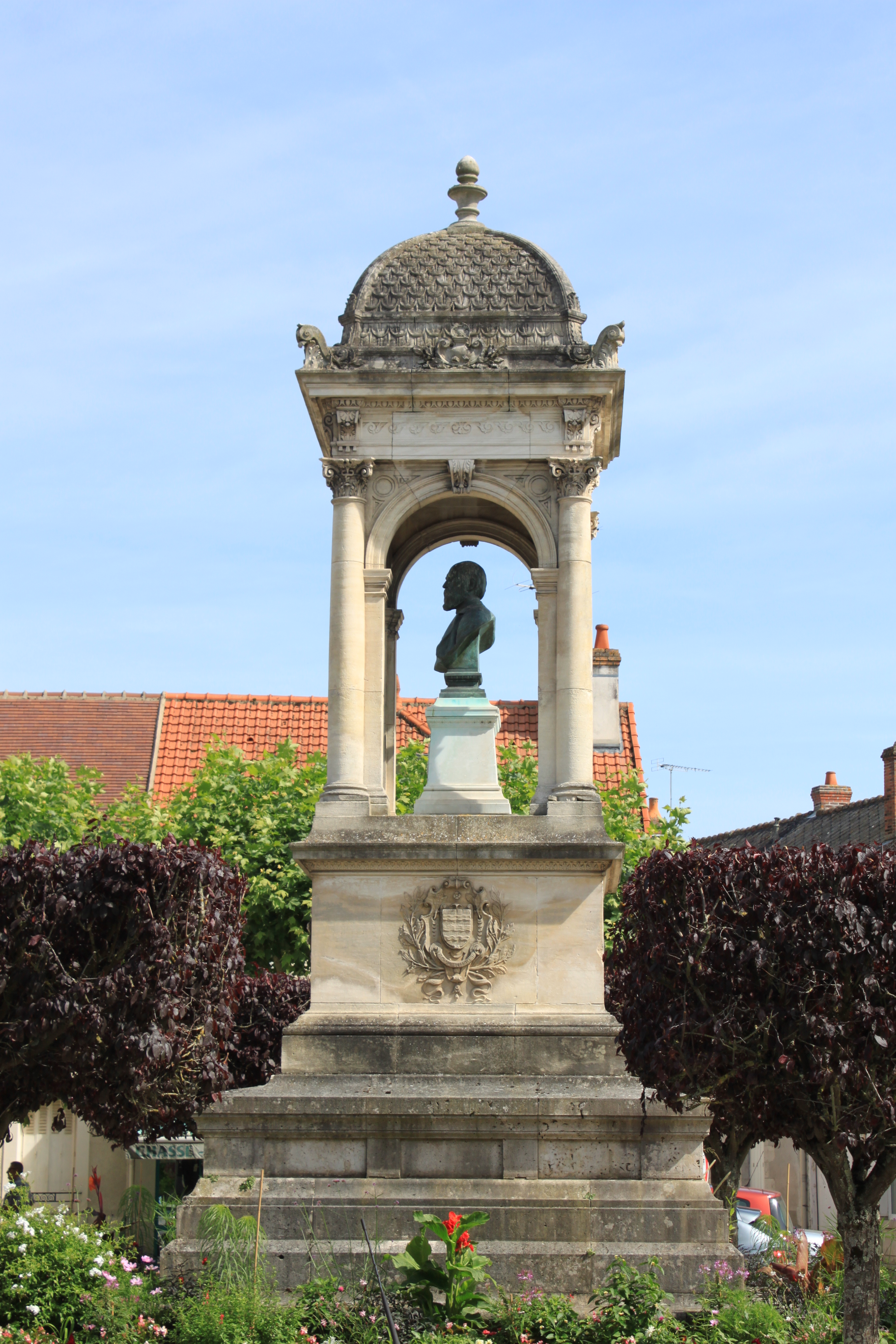 Monument à Bapterosses, Briare, Loiret, France